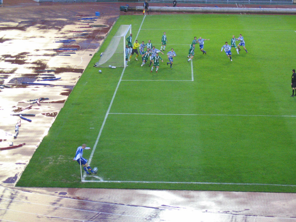 Corner kick during IFK Göteborg-Hammarby IF 11 November 2005 on Ullevi, Gothenburg.